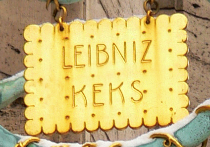 Leibnizkeks